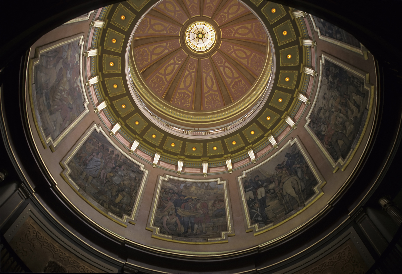 Alabama State Capitol Dome Interior